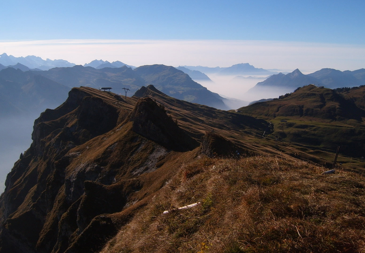 View from Sternen, Hoch-Ybrig, Canton of Schwyz, Switzerland Photographer: Markus Bernet Date: 10/16/2005